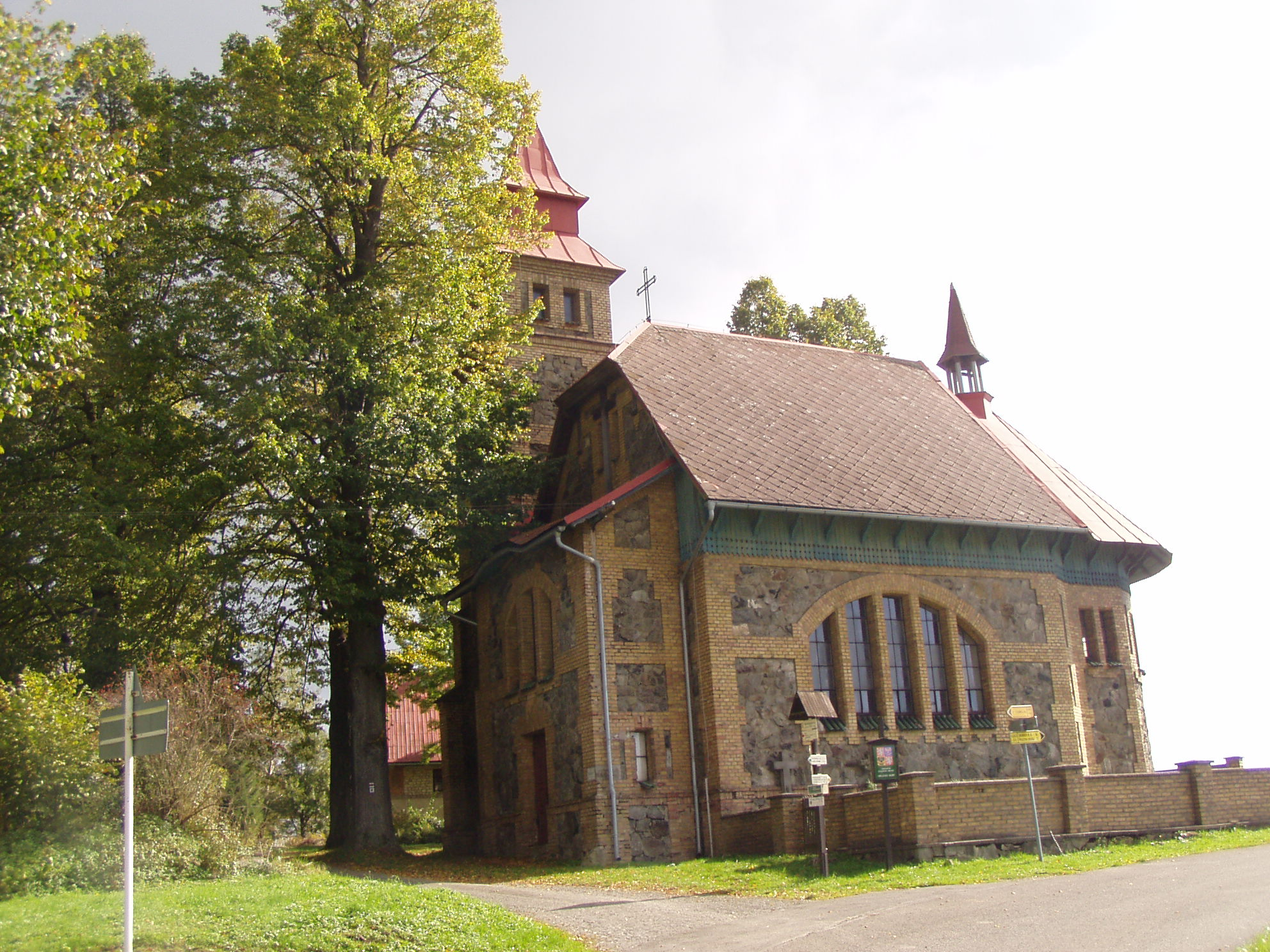 Kostel sv. Josefa na Šedivinách